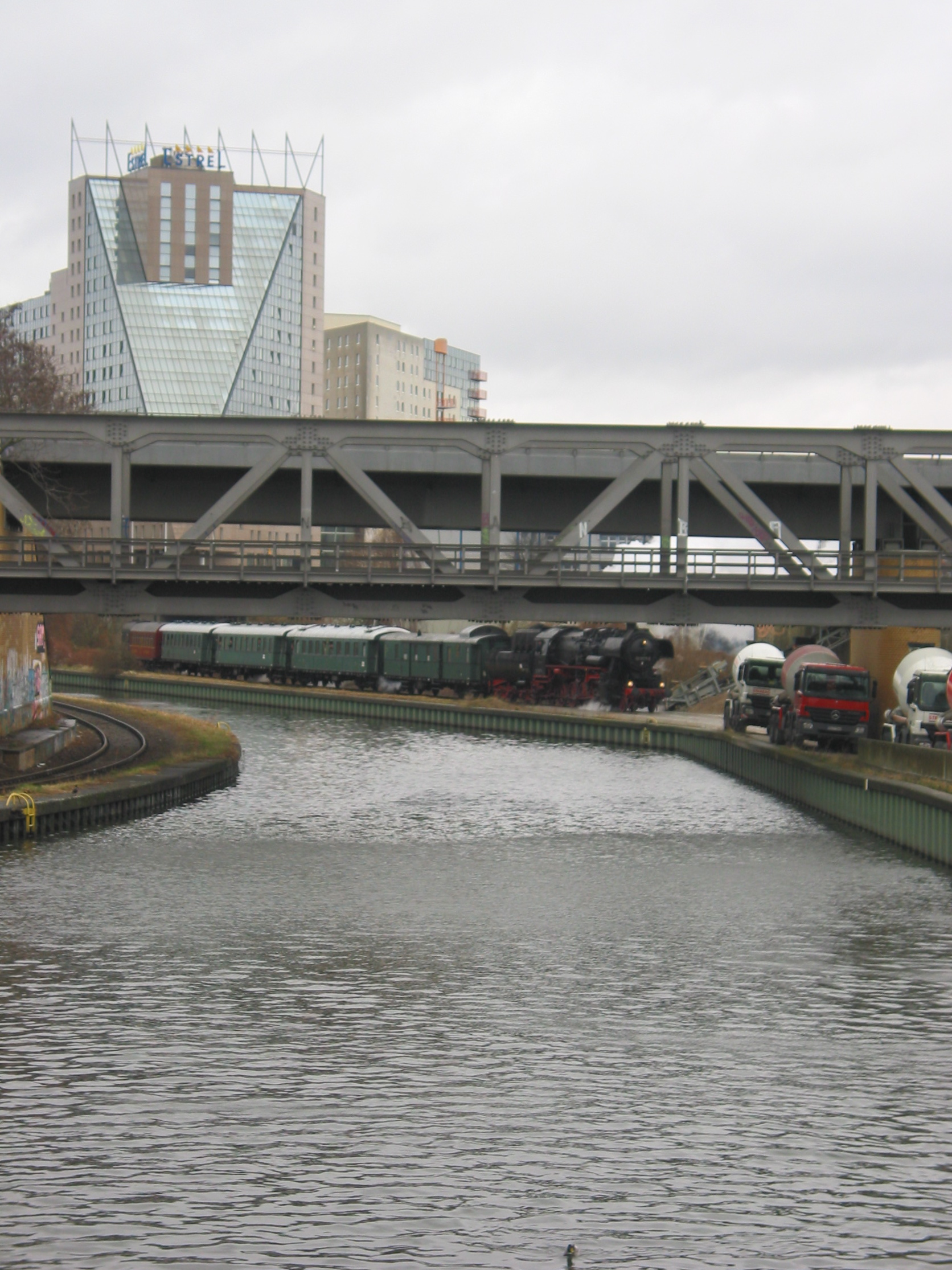 Berlin, Neukoelln: Dampflok 52 8177 mit einem Sonderzug vom Hotel Estrel kommend auf den Gleisen der Industriebahn Gesellschaft Berlin}.